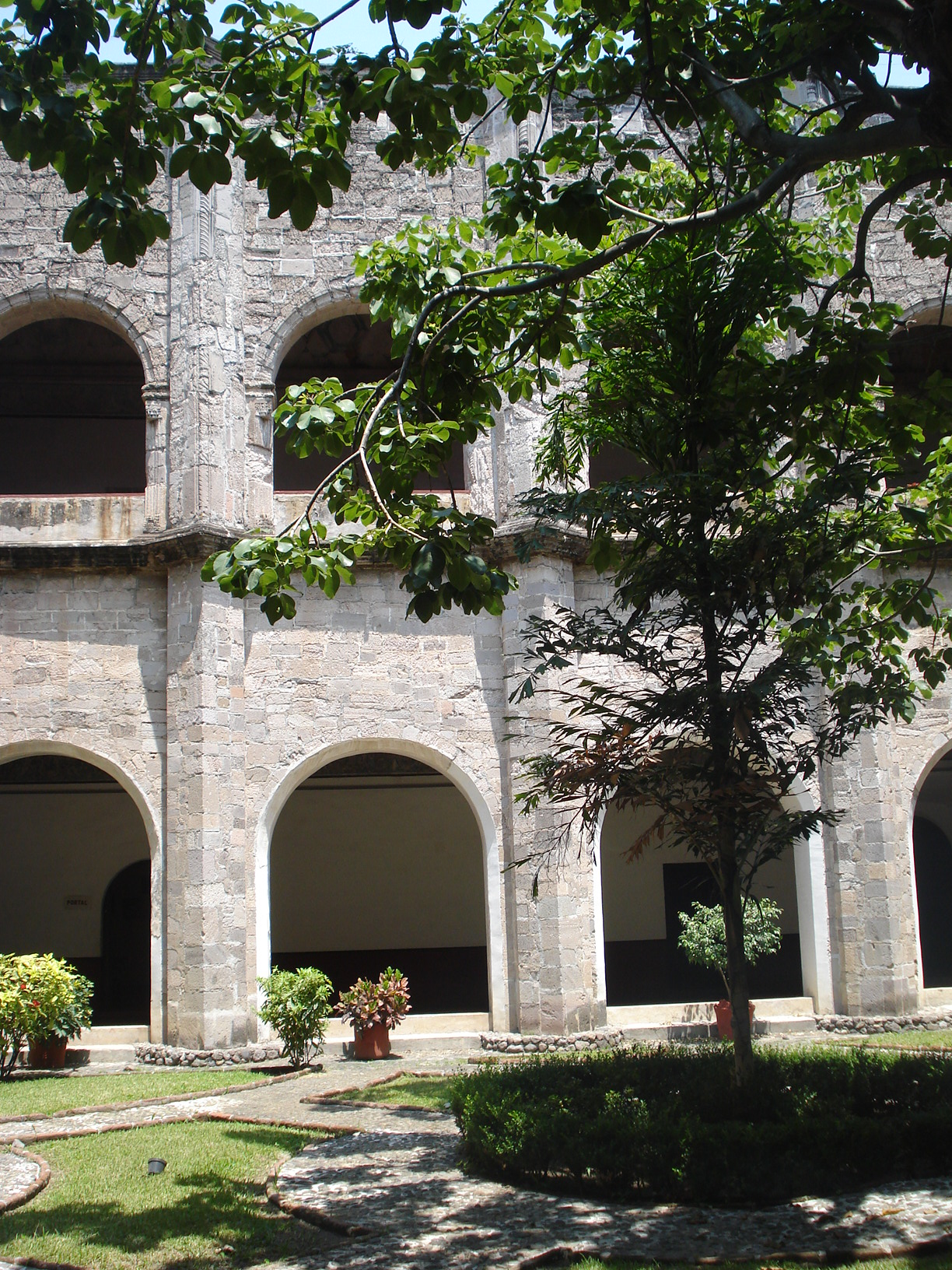 Santo Domingo de German, Oaxtepec, Morelos, Mexico